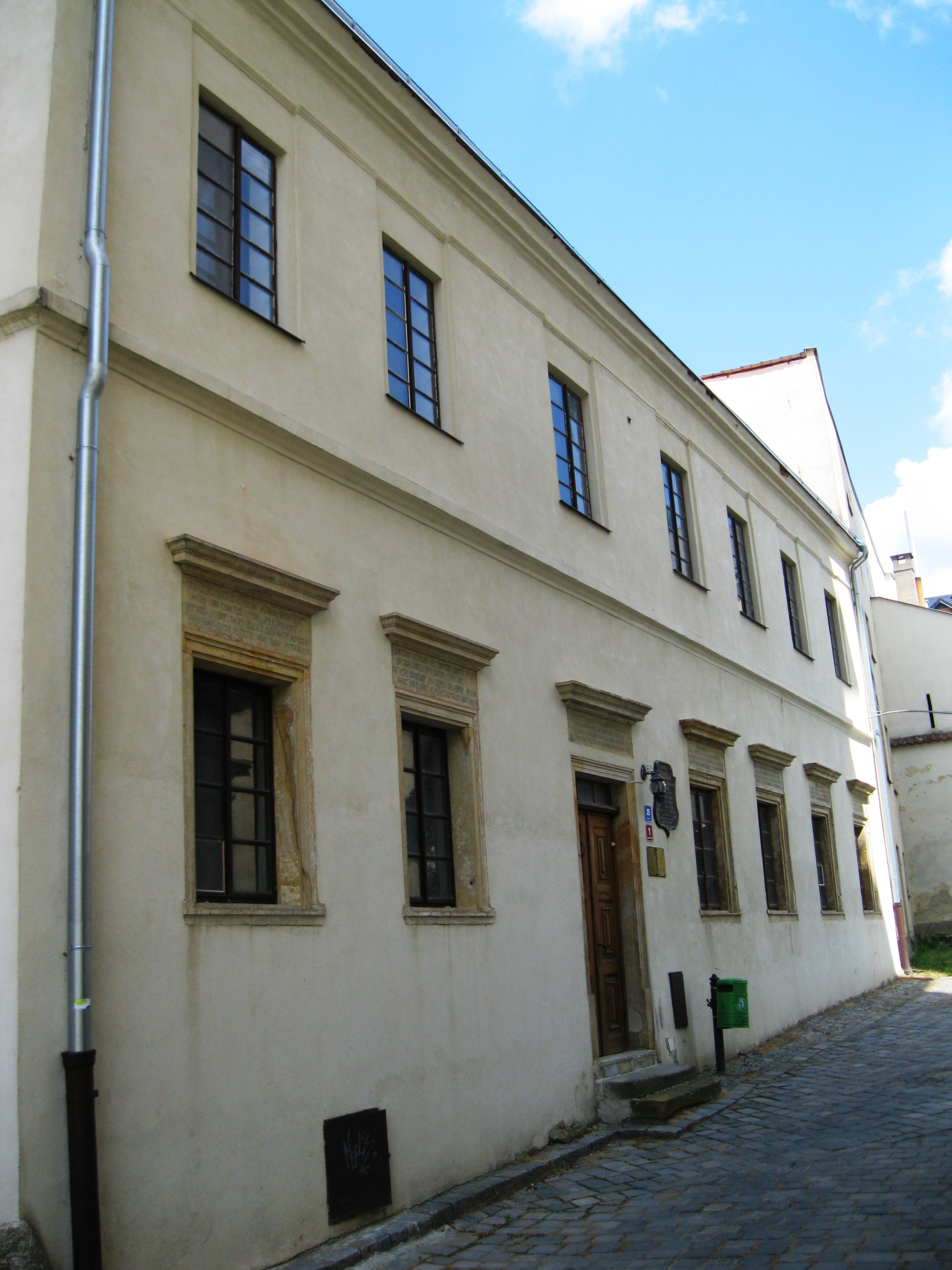 Latinská škola (Moravská Třebová), Kostelní nám. 25/1, Moravská Třebová